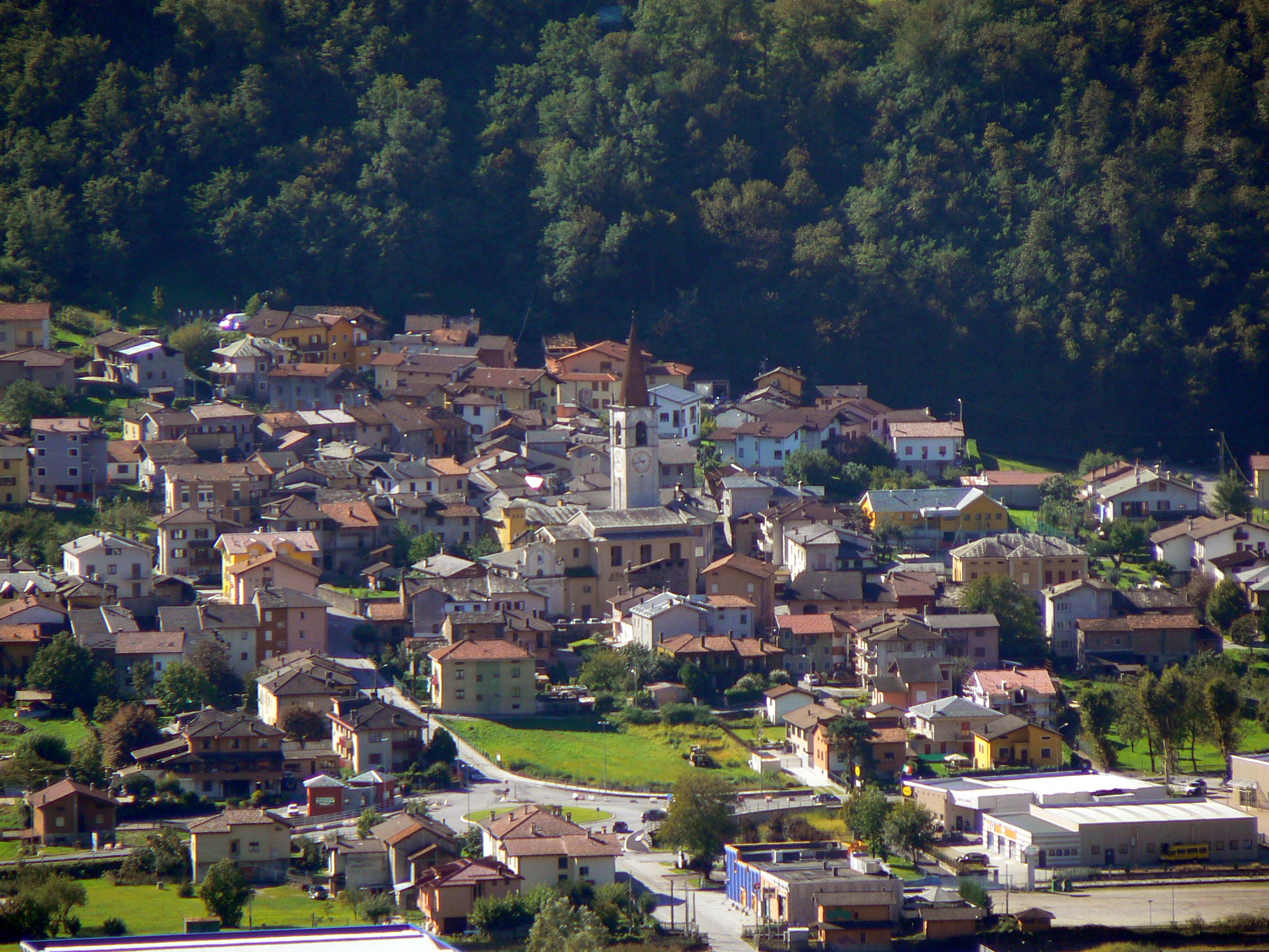 Abitato di Rogolo 002